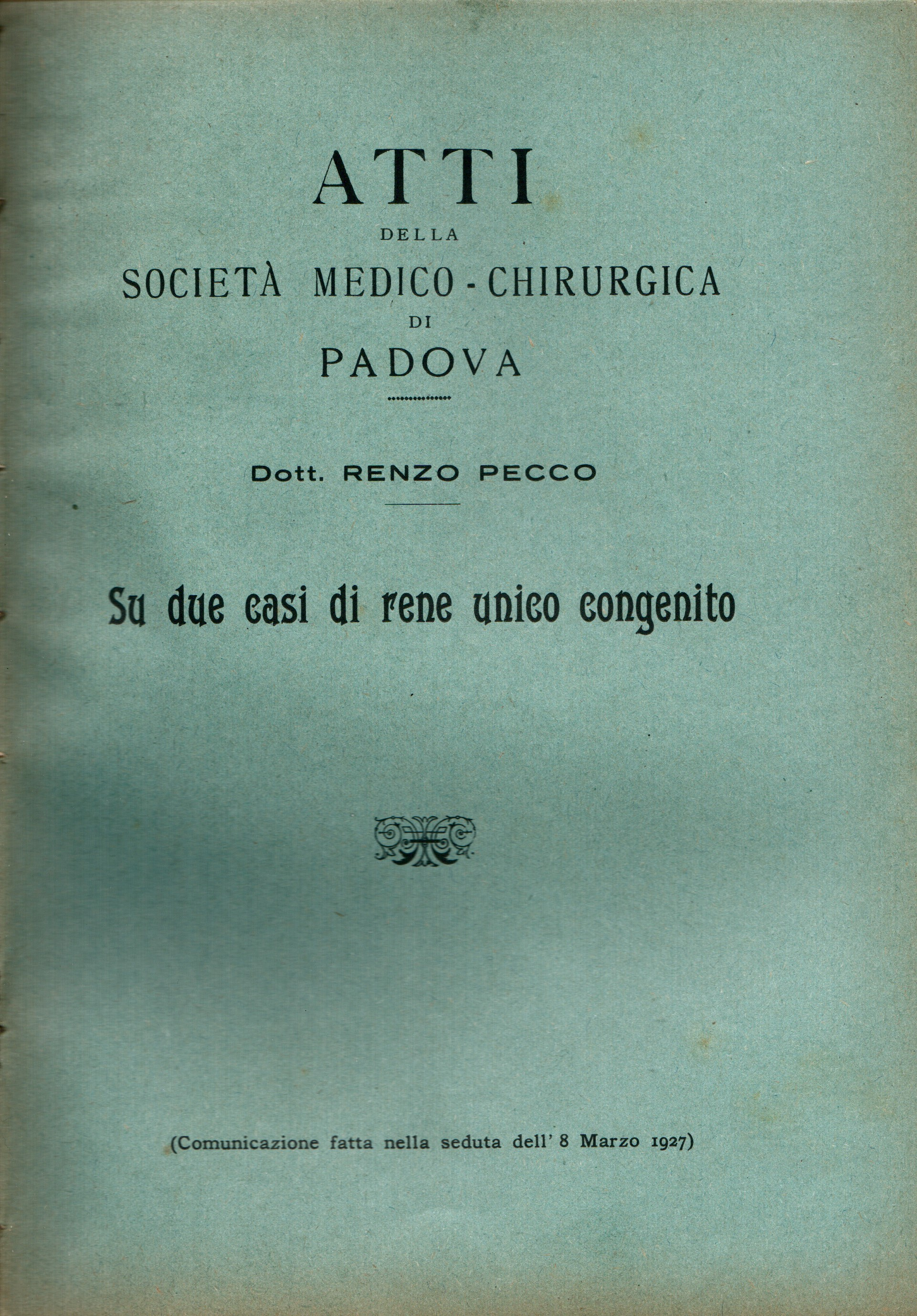 Articolo "Su due casi di rene unico congenito" di Renzo Pecco